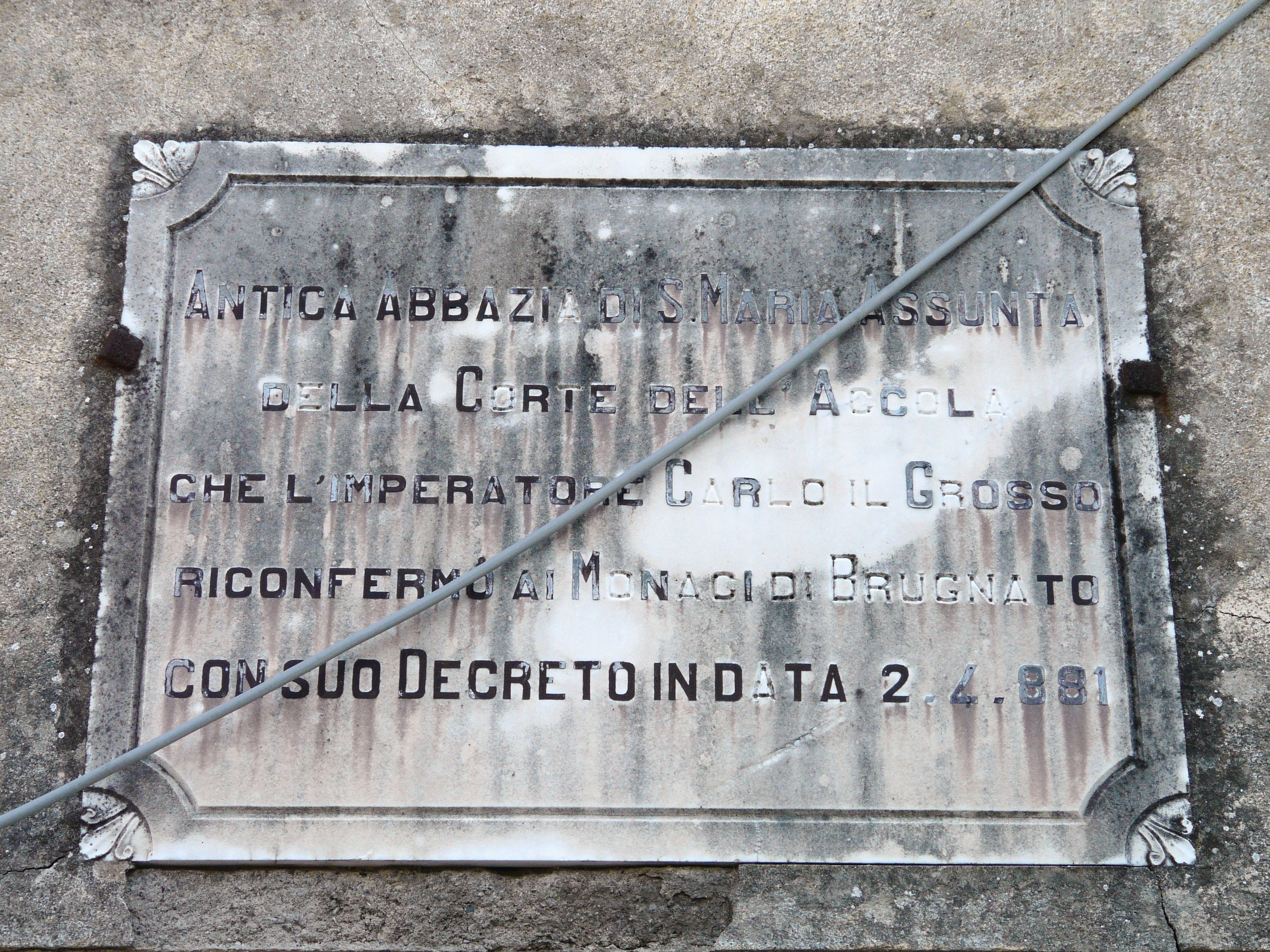 Abbazia dell'Accola, Borghetto di Vara, Liguria, Italia